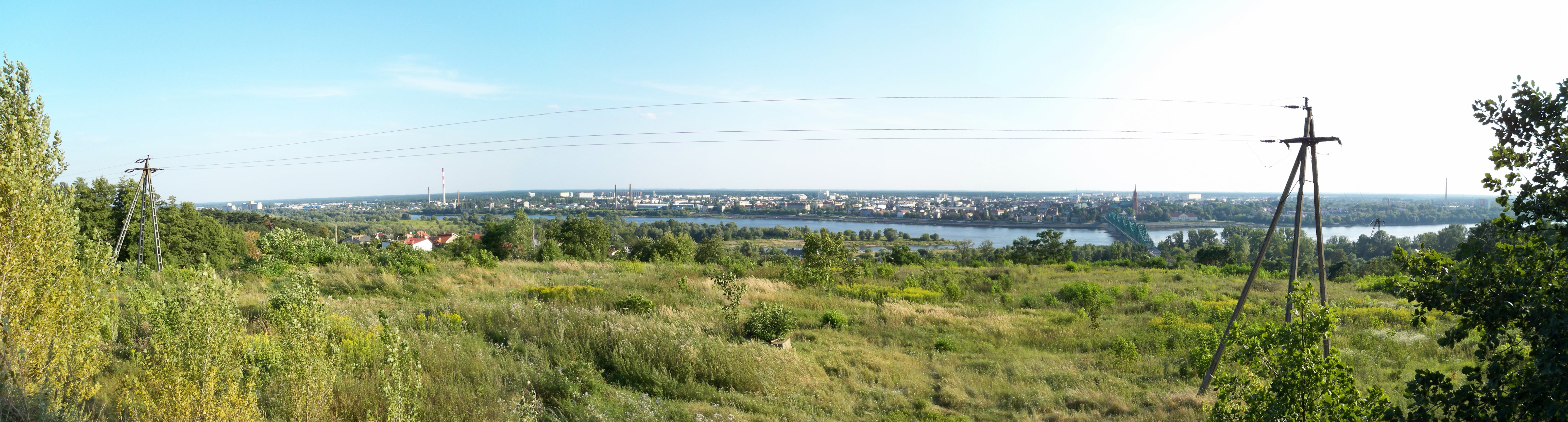 Widok ze Wzgórz Szpetalskich (2009 r.)